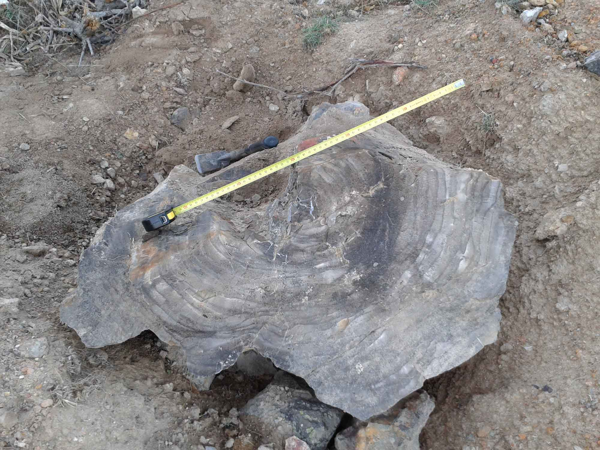 Tronco de árbol petrificado que salió a la superficie en el momento de la reforestación del pinar en Rillo de Gallo (Guadajara)